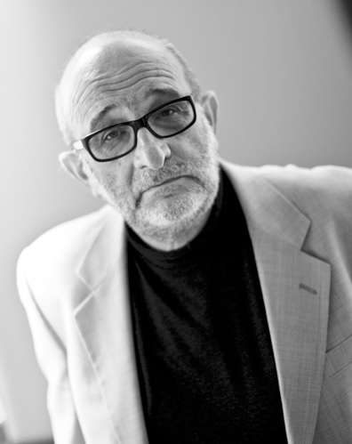 Kriminologen Jerzy Sarnecki.